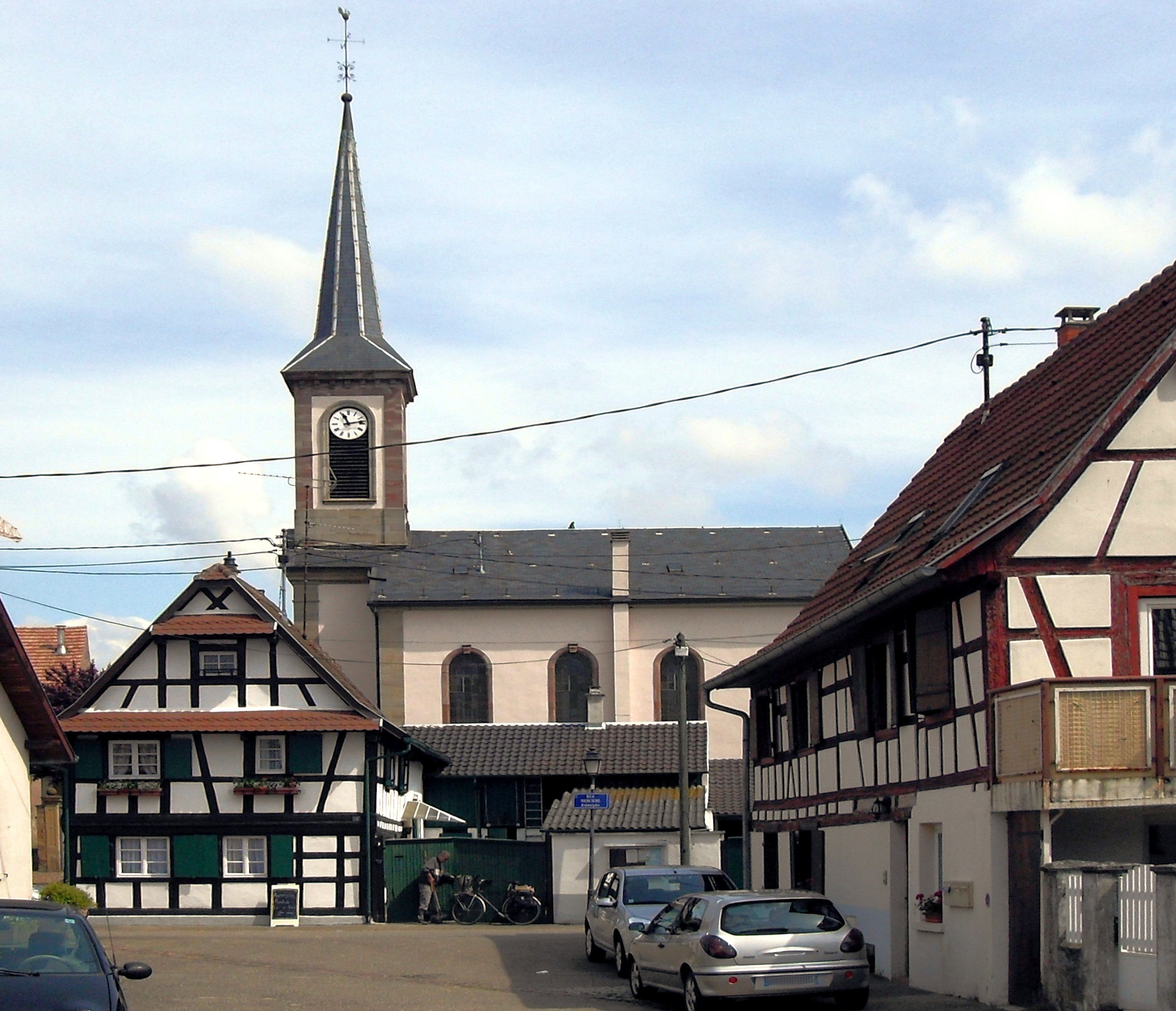 Le temple Protestant à Niederhausbergen